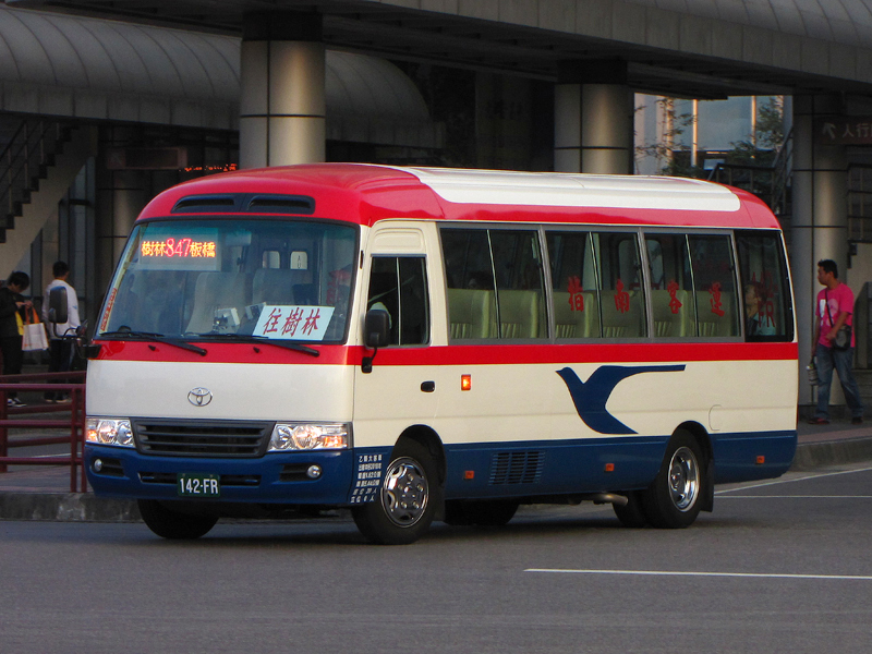 指南客運的豐田Coaster小巴士142-FR